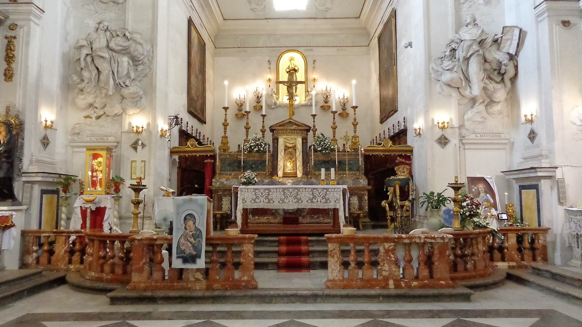 Presbiterio.